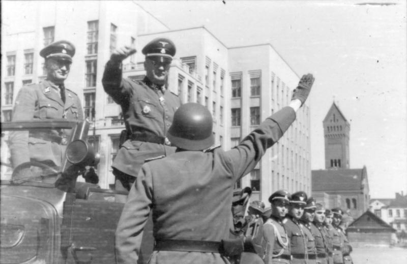 Information added by Wikimedia users.Беларуская (тарашкевіца): Парад паліцыі аховы грамадзкага парадку, пастаноўка на пляцы Леніна (былым пляцы Незалежнасьці) ў Менску, БССР. СС-обэргуппэнфюрэр і генэрал паліцыі Эрых фон Бах-Зэлеўскі прымае парад. 1943 год.